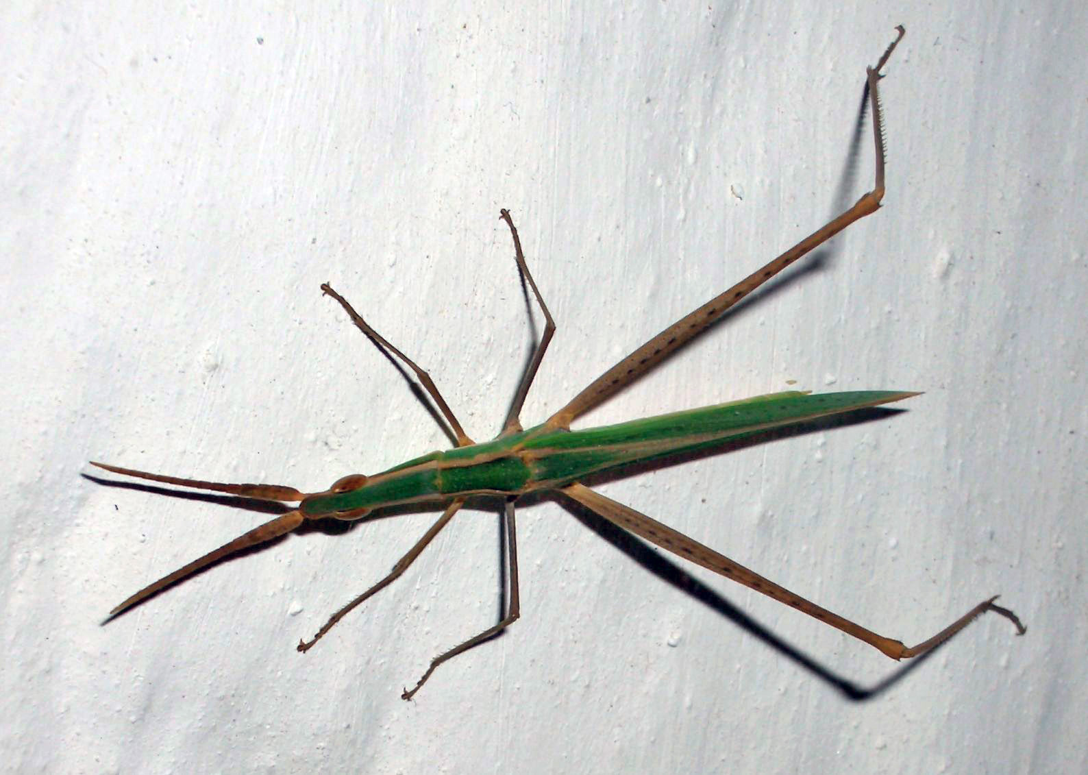 Gewöhnliche Nasenschrecke (Acrida ungarica), aufgenommen in Albanien